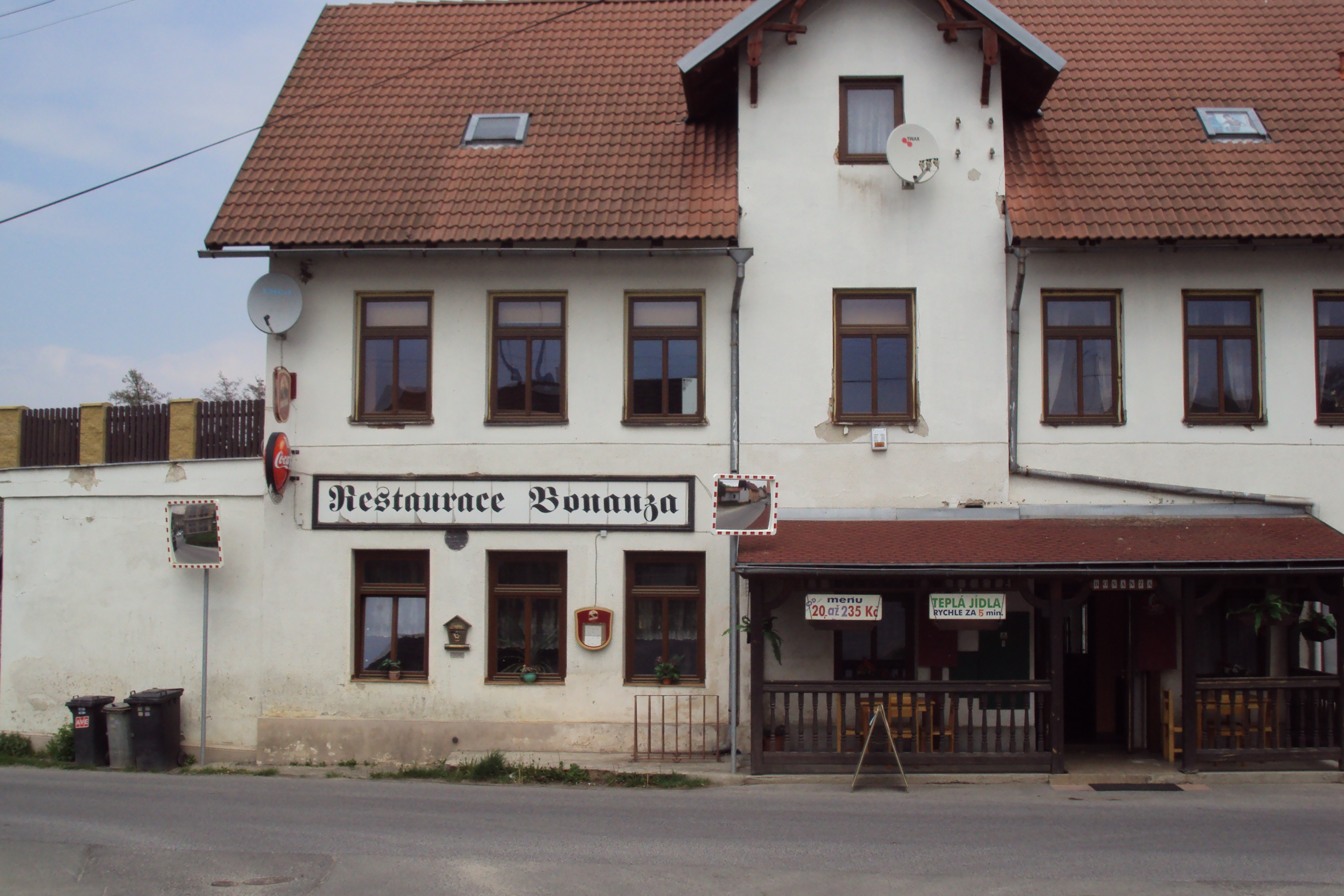 Restaurace Bonanza v Brništi, části Jáchymov